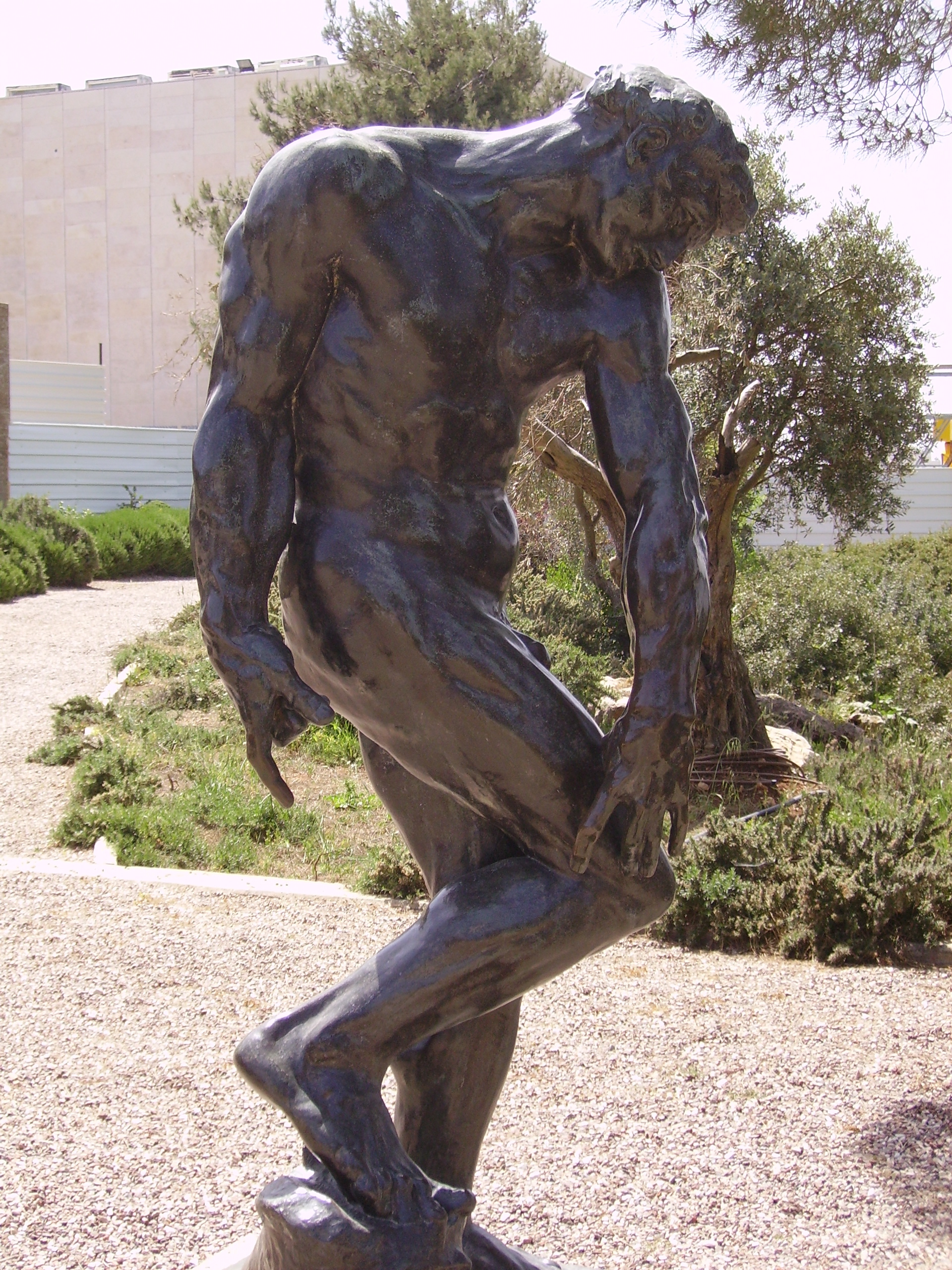 Adam by Rodin